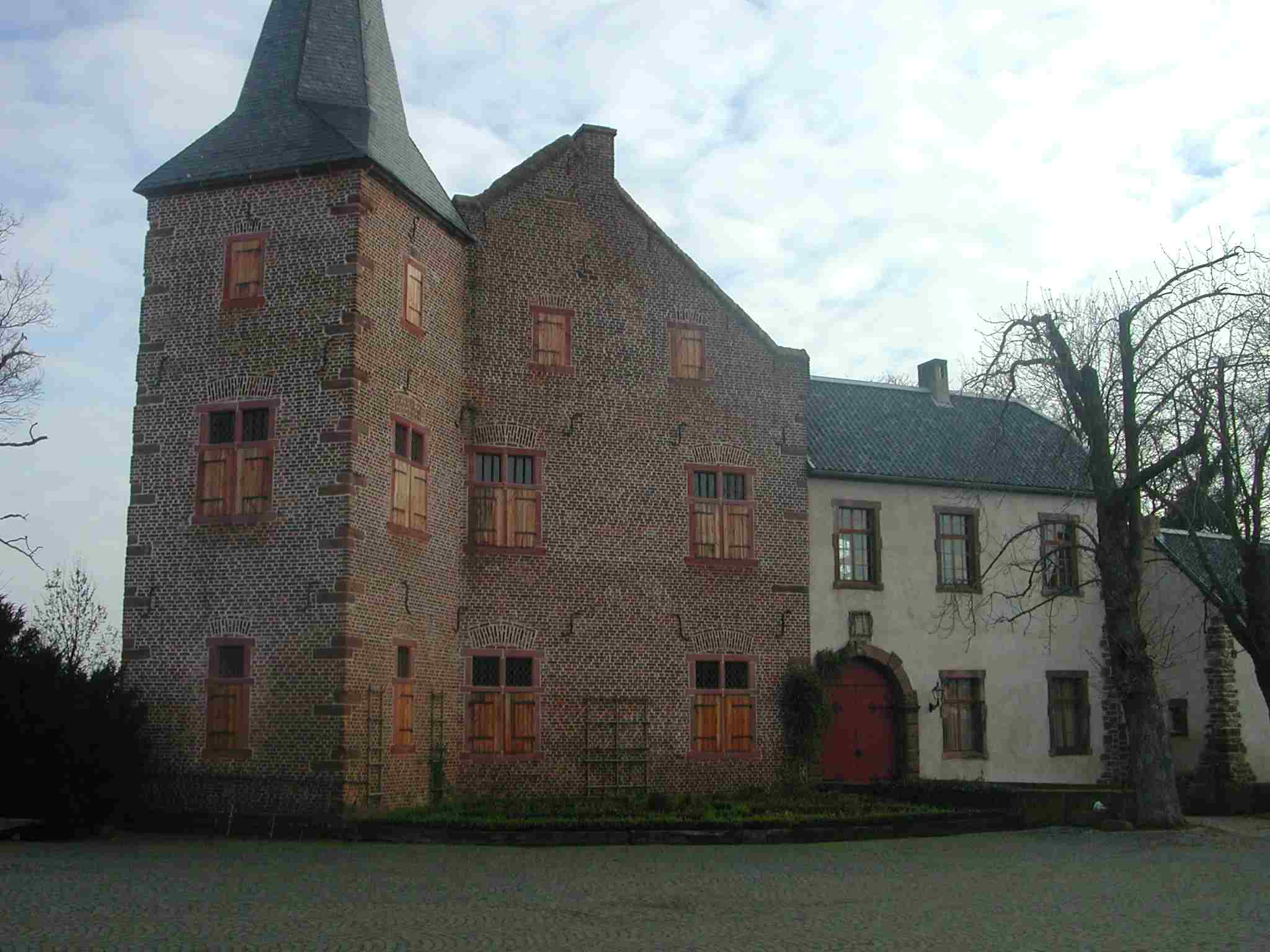 Burg Bubenheim, Ansicht own work papa1234 2002-12-04